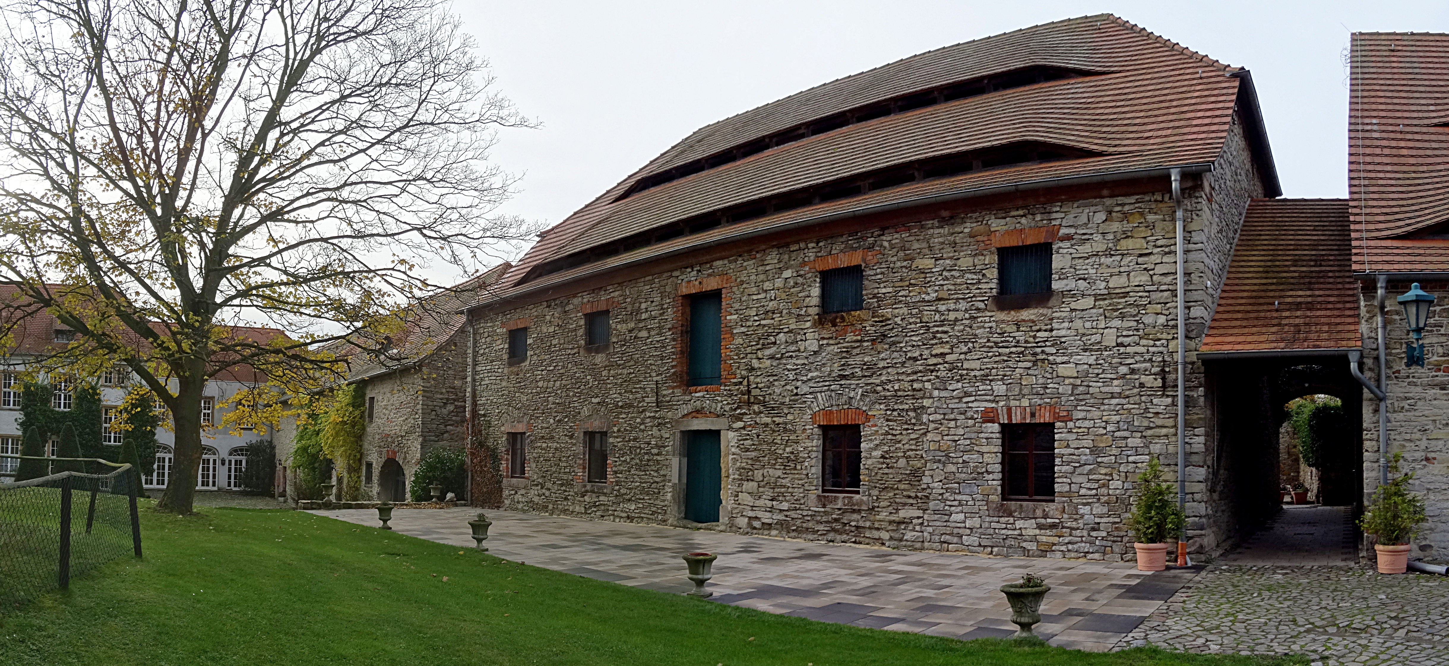 Burg Wanzleben